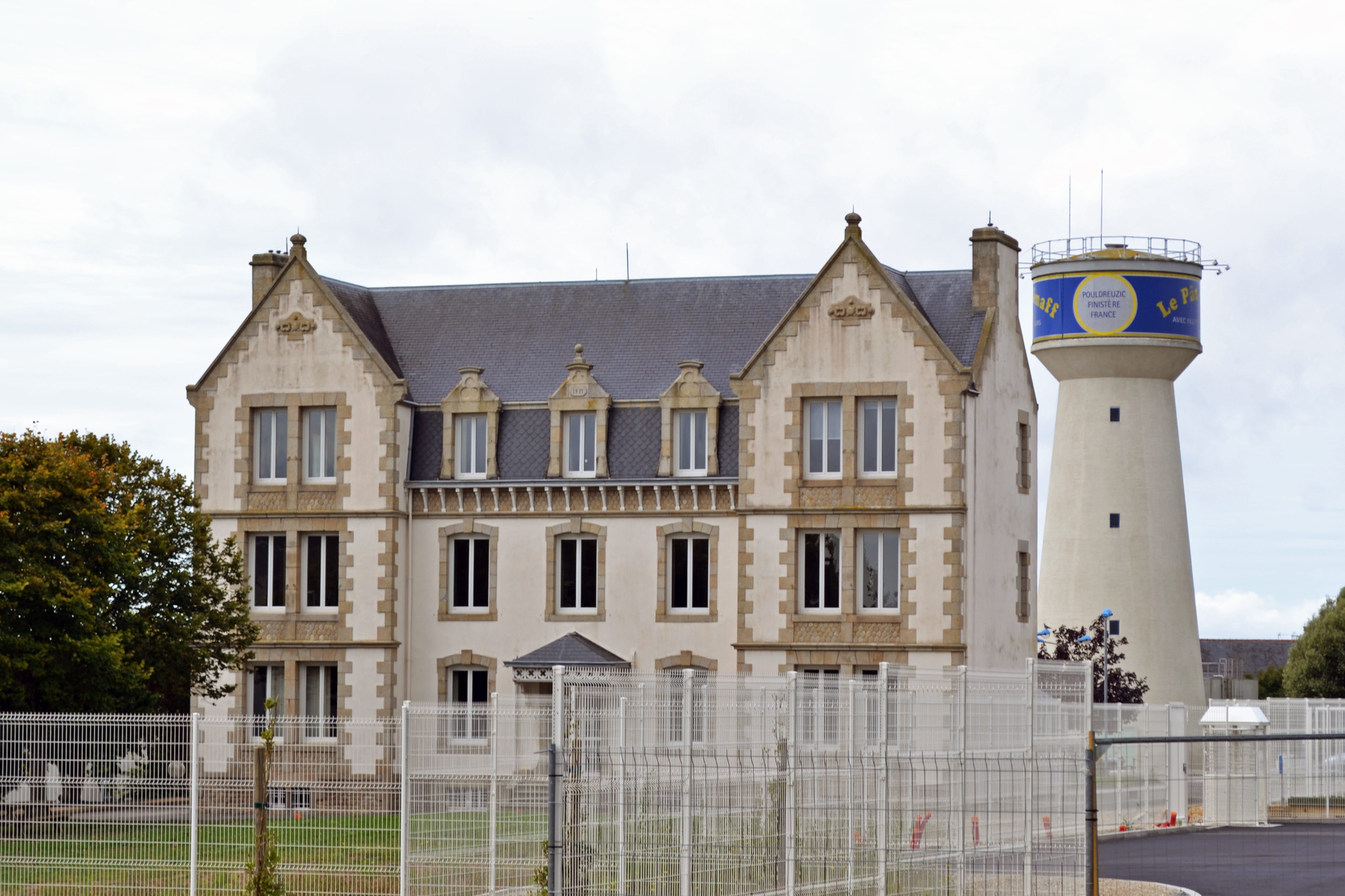 Garden Pâté : rassemblement festif avec un pique-nique dans le jardin de la maison du Pâté Hénaff le dimanche 24 août 2014.